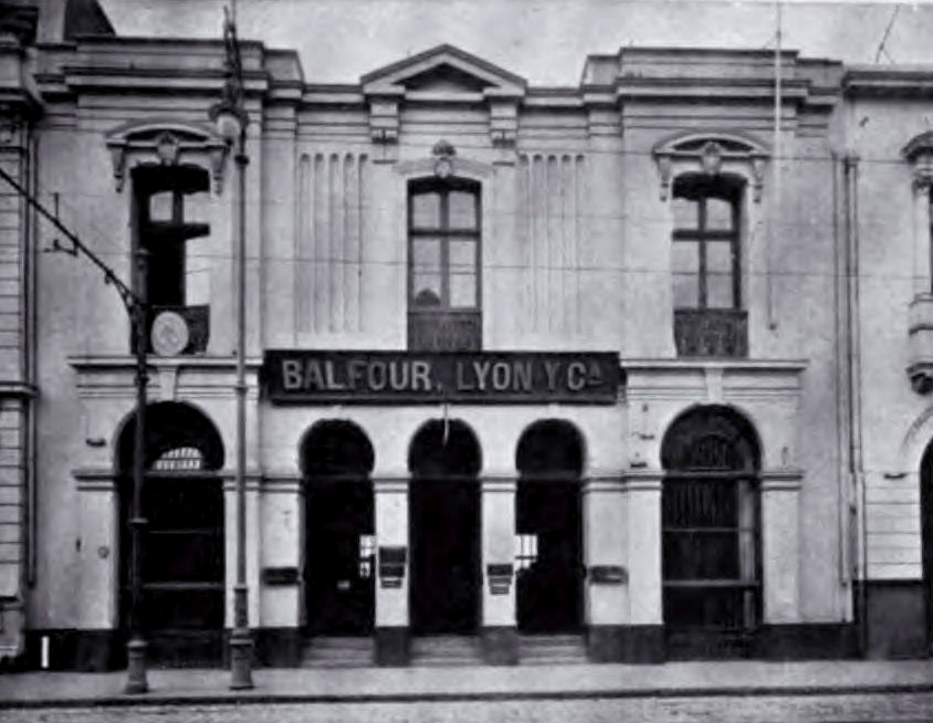 Oficinas en calle Blanco de Balfour Lyon y Cia.